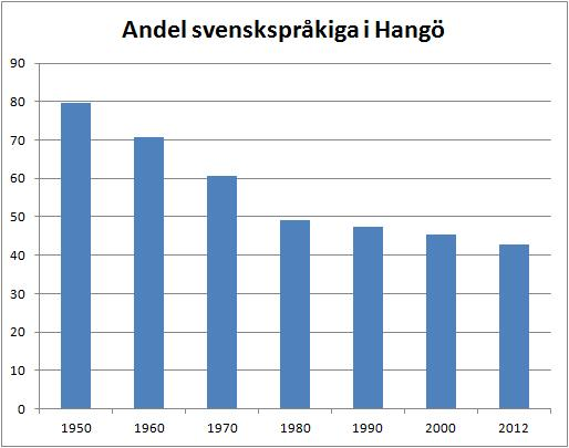 Andel svensktalande i Hangö 1950-2012. Källa